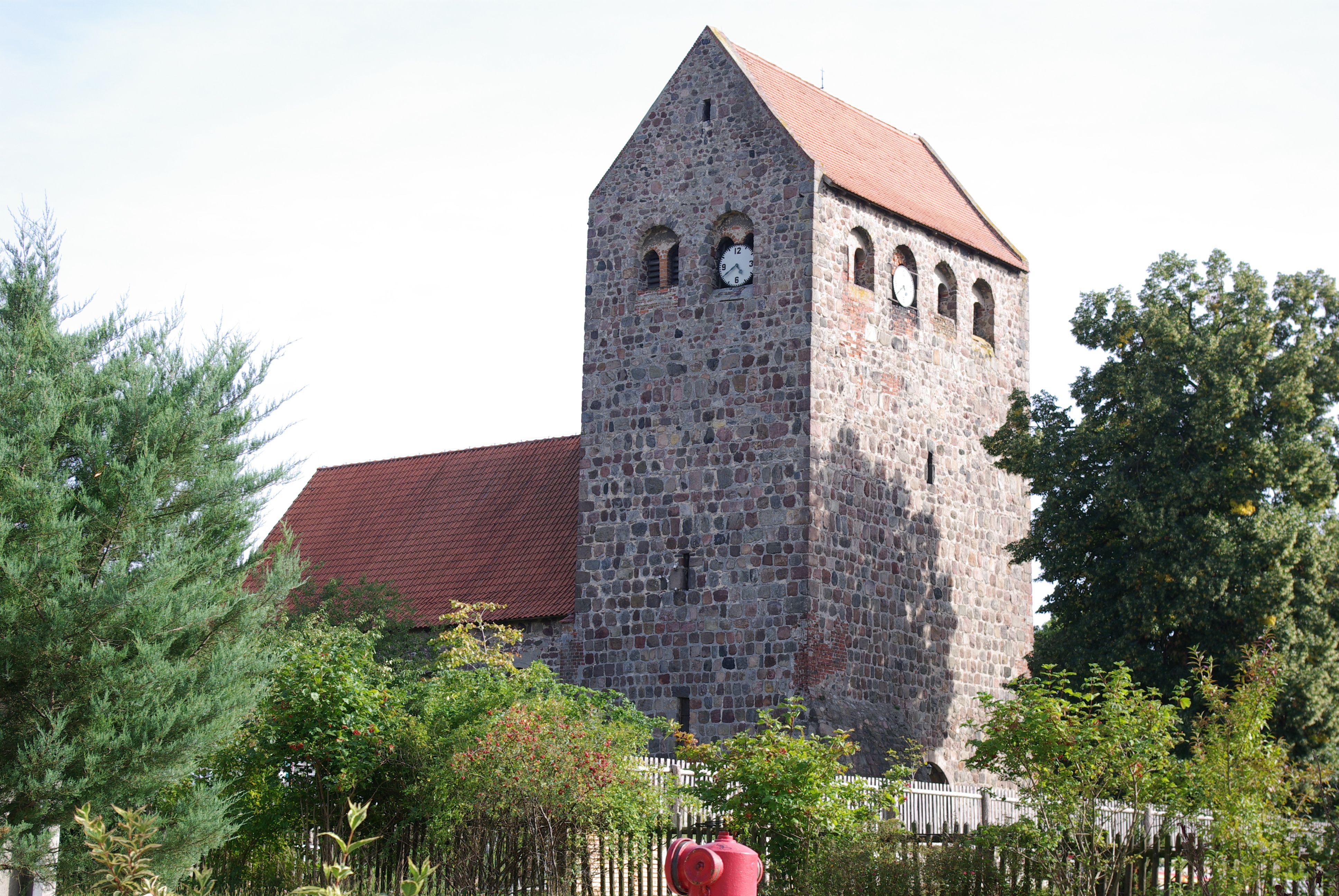 Wiesenburg/Mark Ortsteil Reetz in Brandenburg. Die Kirche steht unter Denkmalschutz.